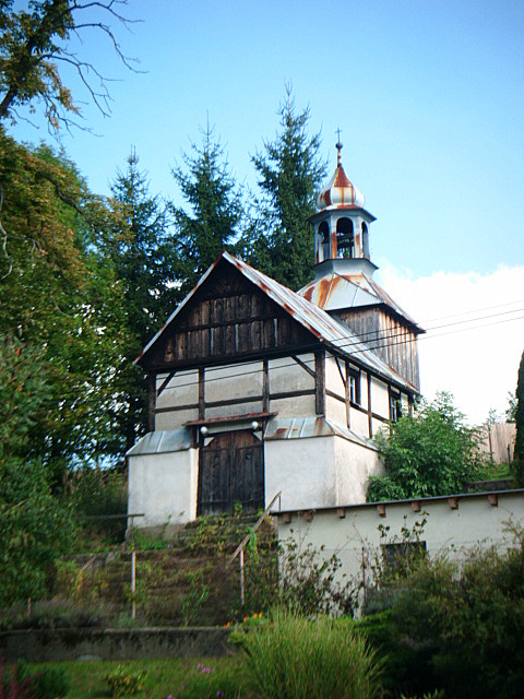 Kaple se zvonicí (Dobrná), Dobrná